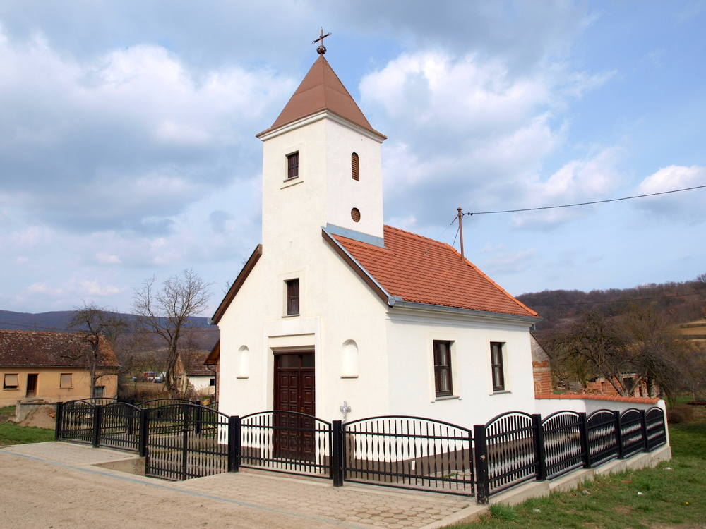 Crkva u selu Donji Slatnik, Brodsko-posavska županija.